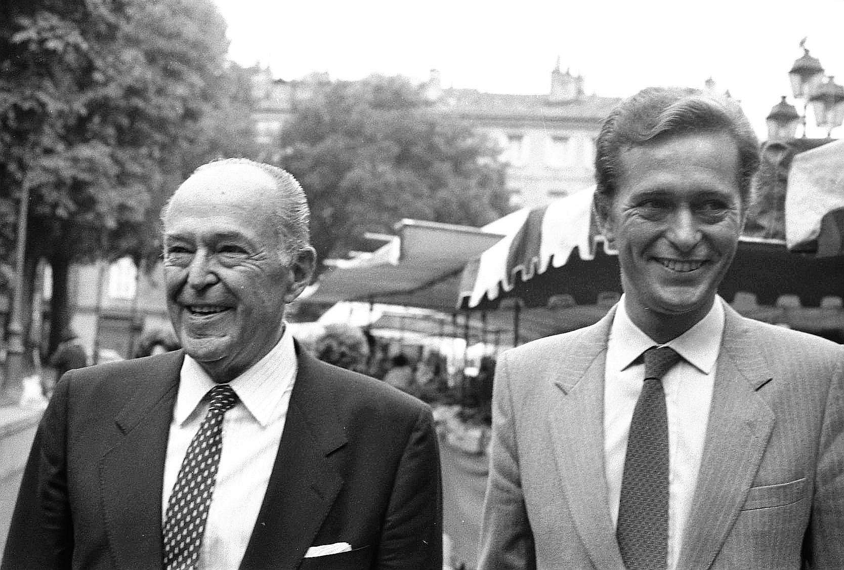 Place Saint-Georges. 12 octobre 1982. Vue de Pierre et Dominique Baudis lors d'un marché de plein vent sur la place.